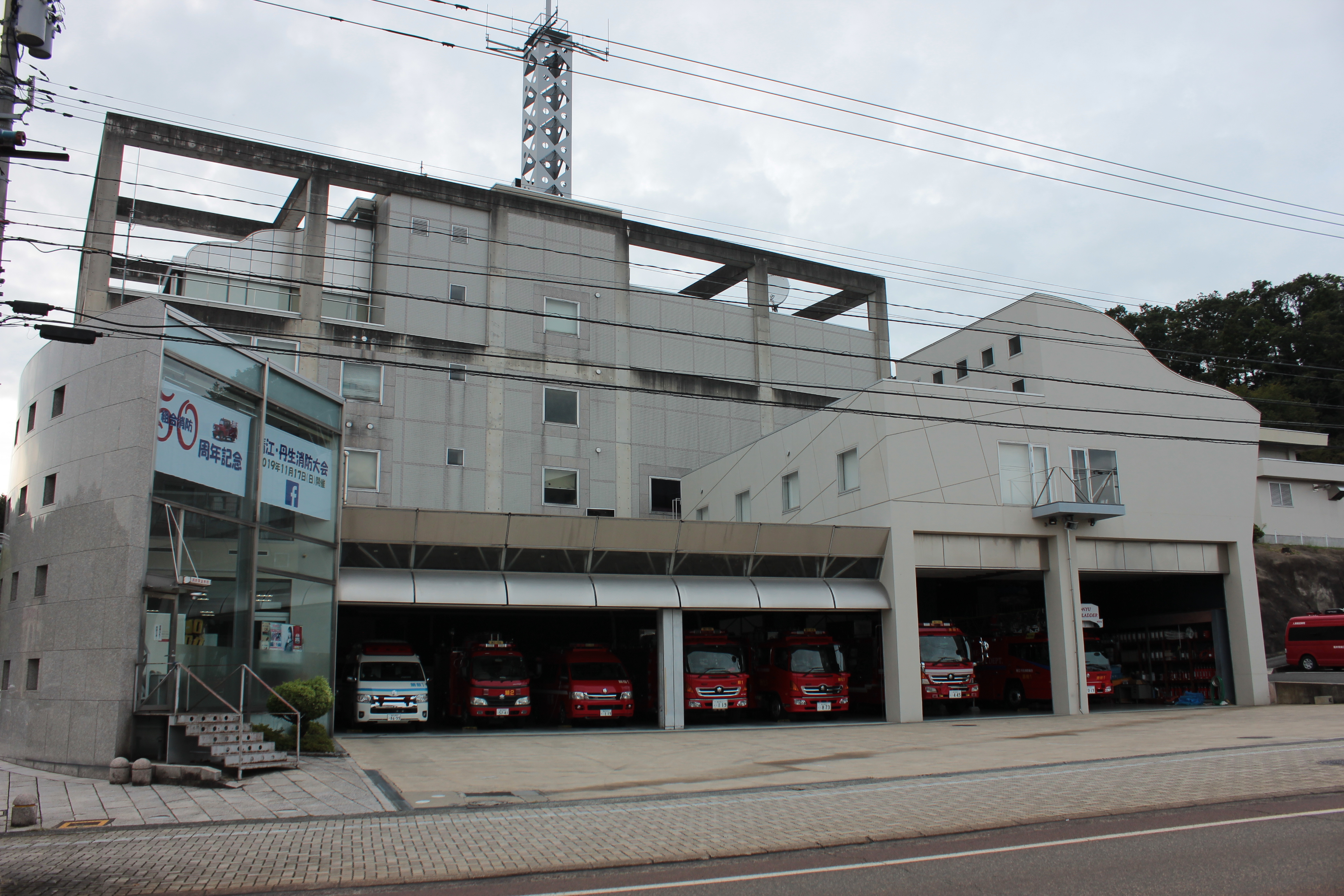 鯖江・丹生消防組合消防本部 Canon EOS Kiss X5